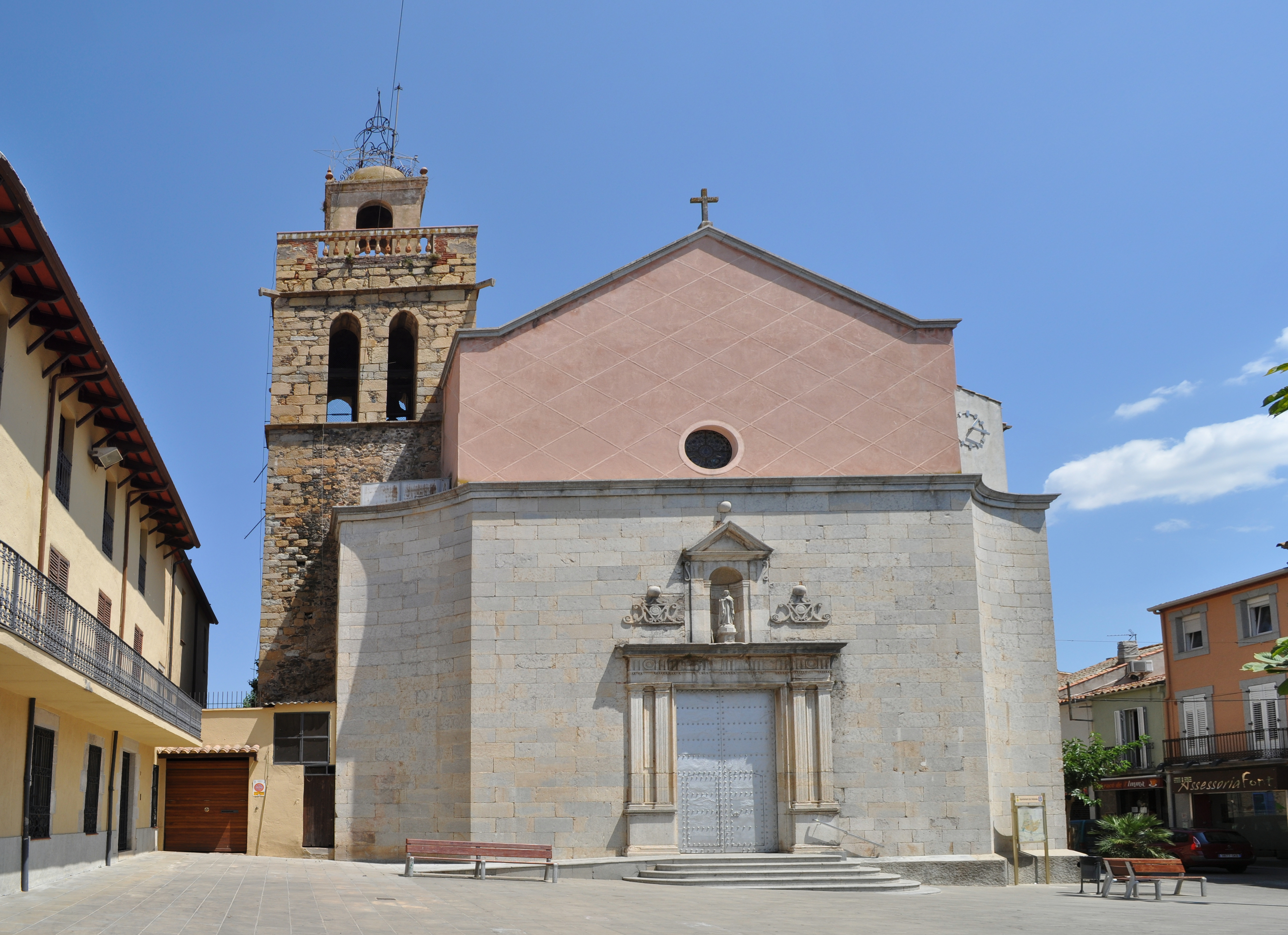 Vidreres, Kirche, Front